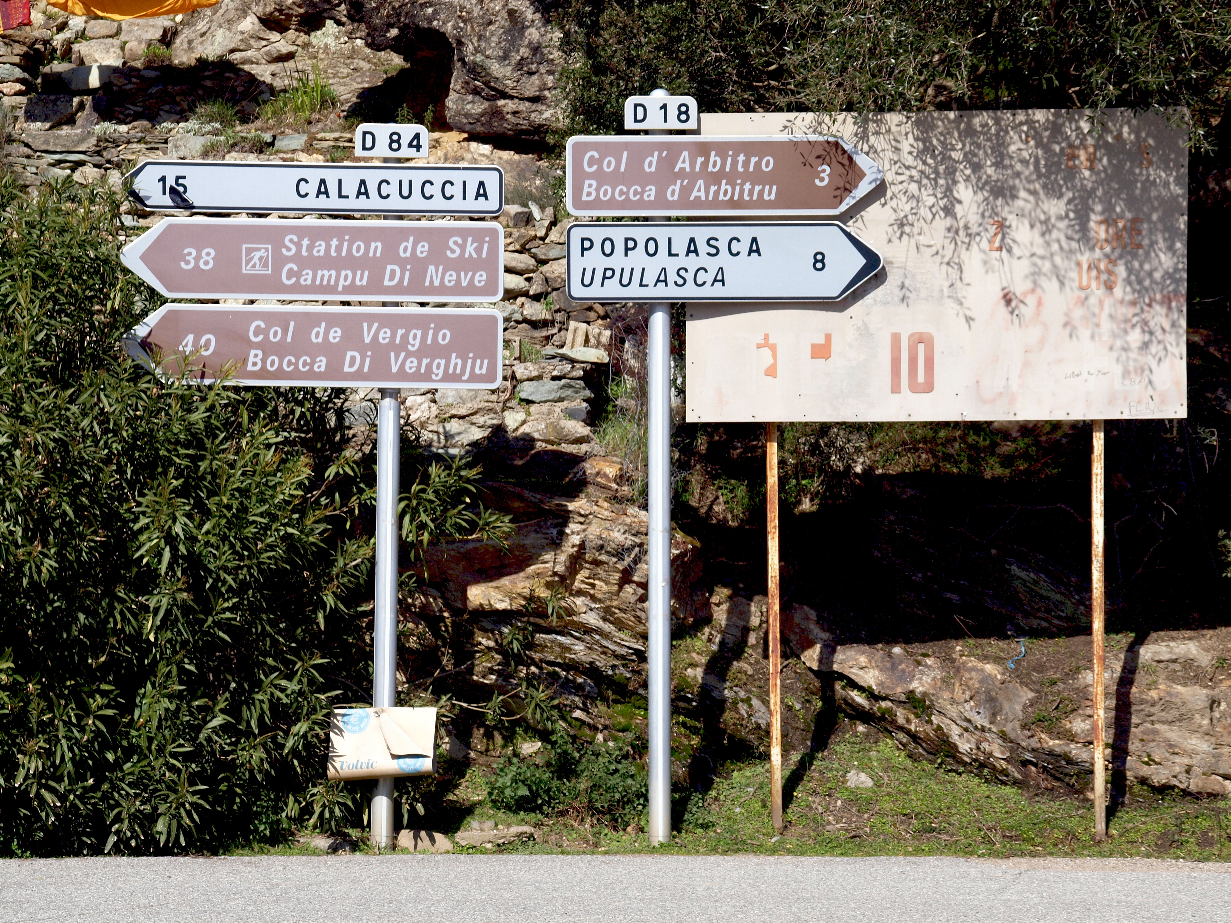 Castirla, Talcini (Haute-Corse) - Panneaux indicateurs à la jonction des routes D18 et D84 à Ponte Castirla